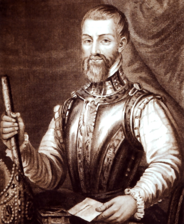 Grabado colonial que representa a Don Pedro de La Gasca (1493-1567) y que se encuentra en la portada de la iglesia de Santa María Magdalena, en Valladolid, España.